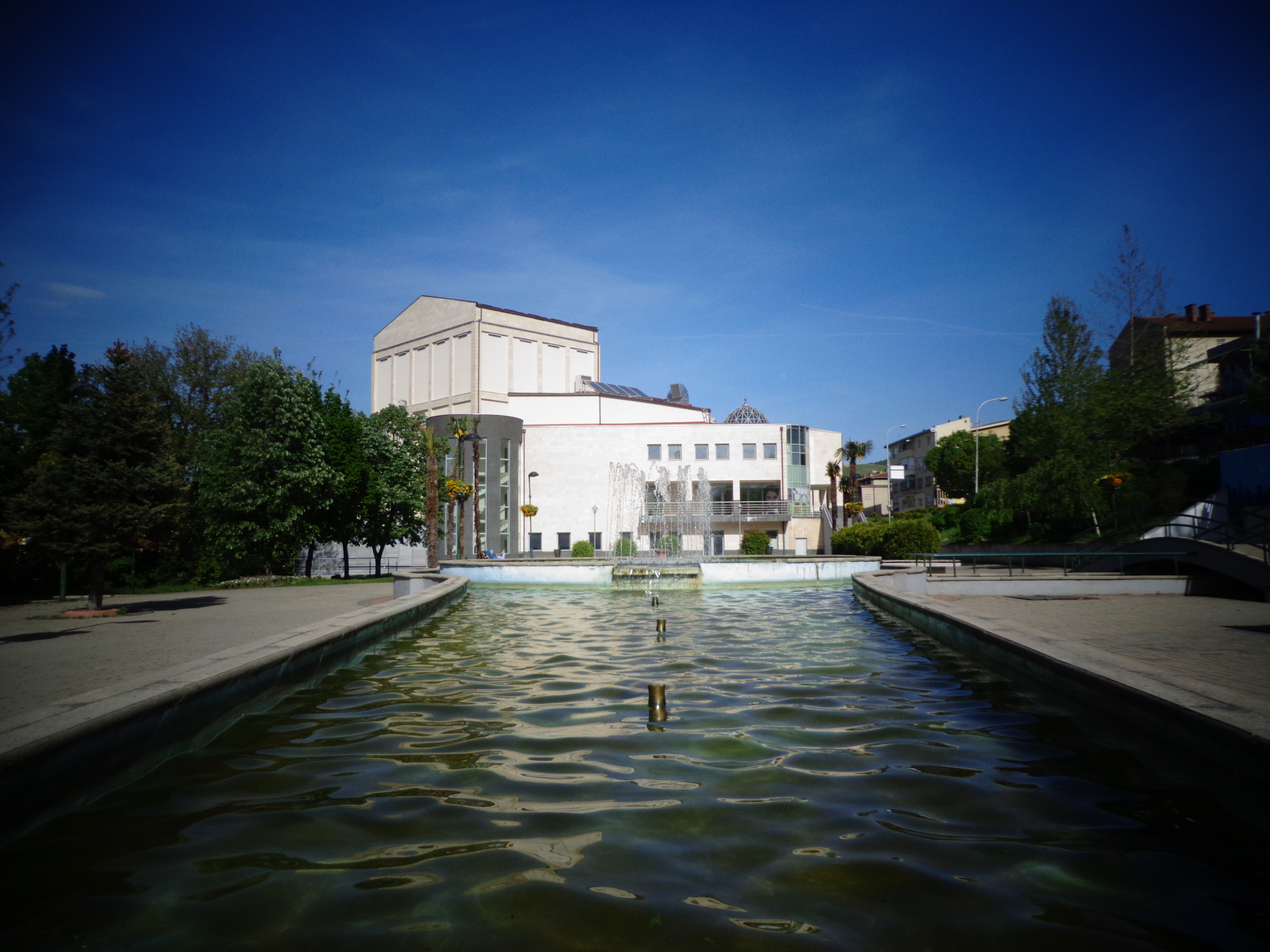 Veles, Macedonia (FYROM)